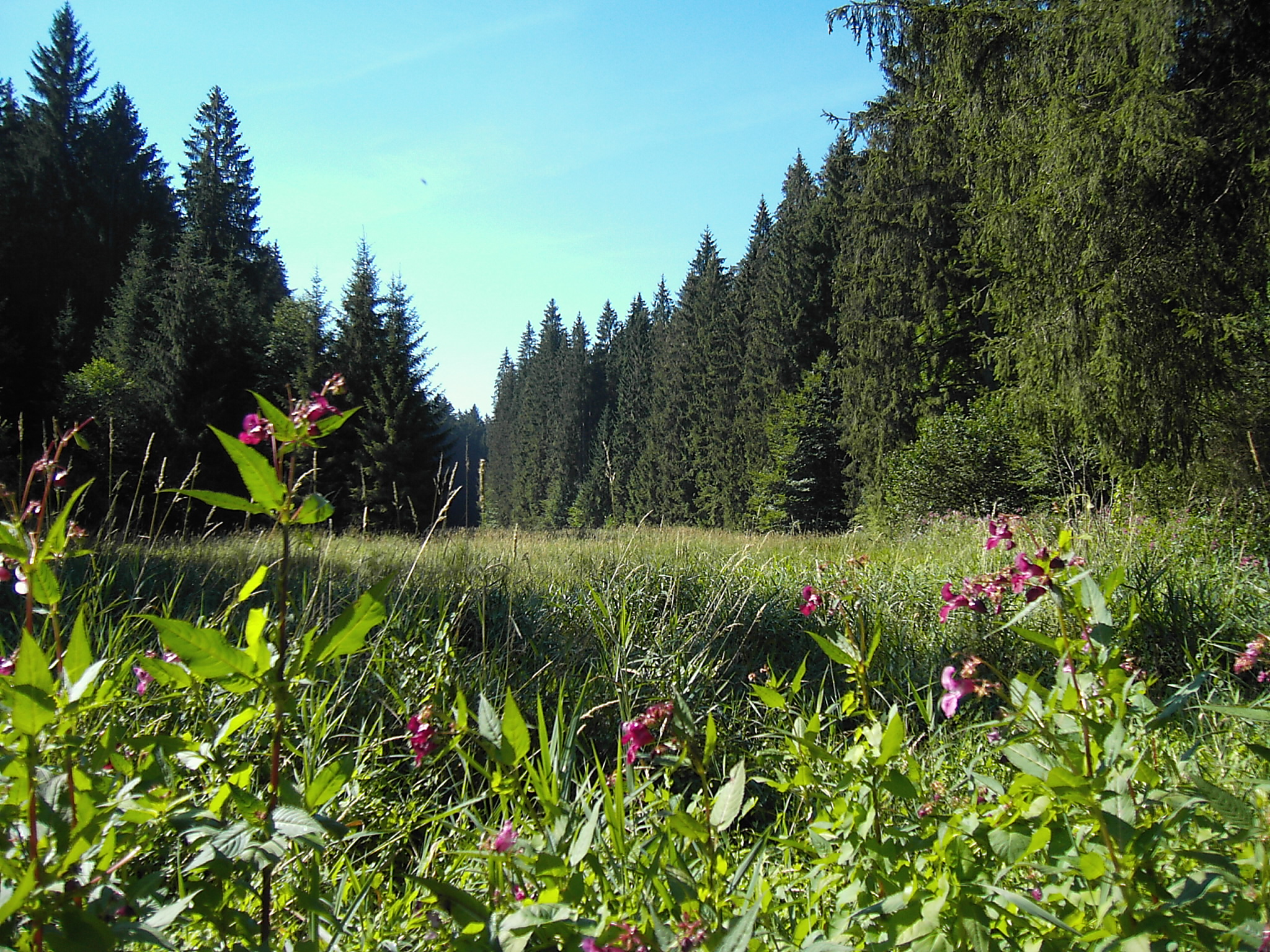 Teufelgraben zwischen Holzkirchen und Dietramszell